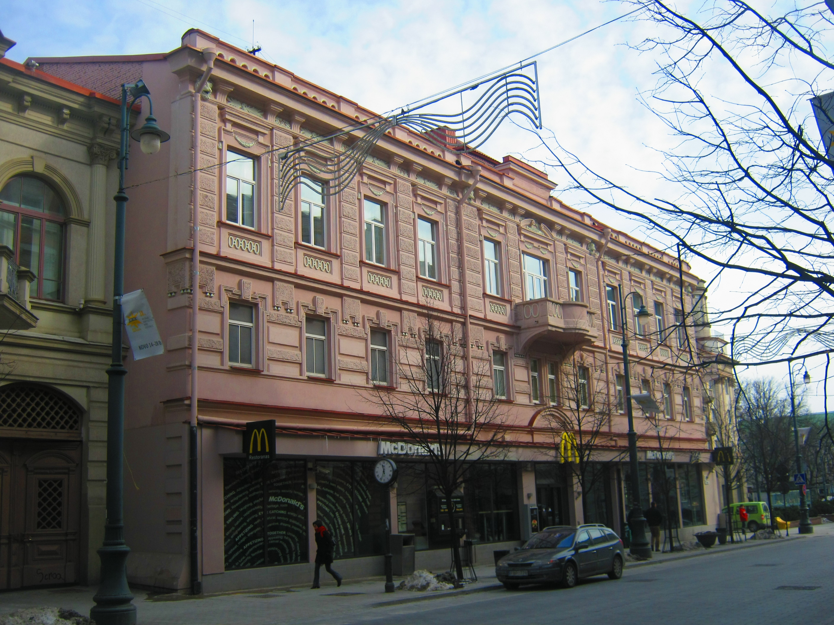 Vilnius